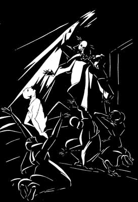 Maria Luiko Grafik